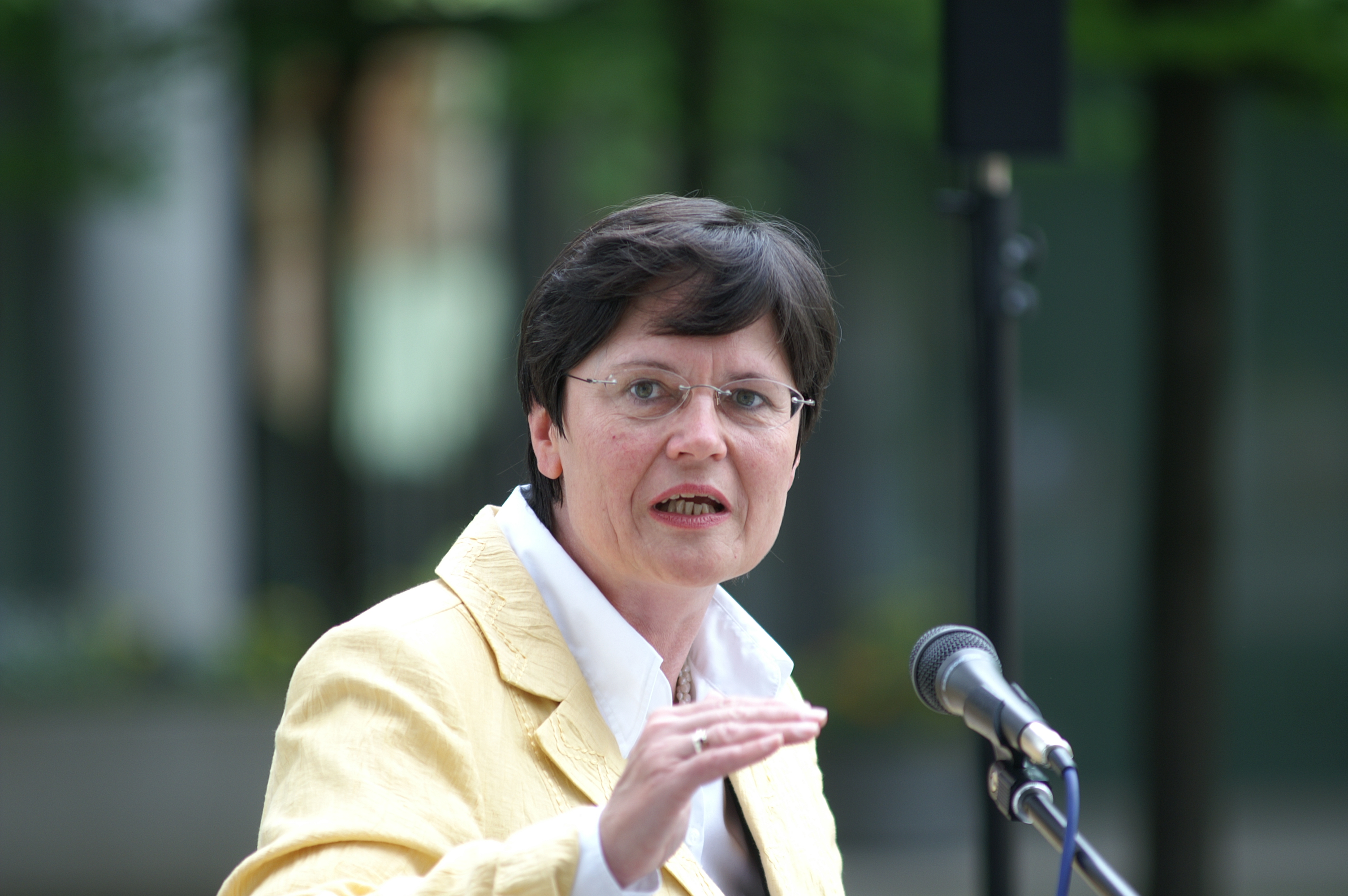 Christine Lieberknecht bei einem Projekt der Berufswegeplanung